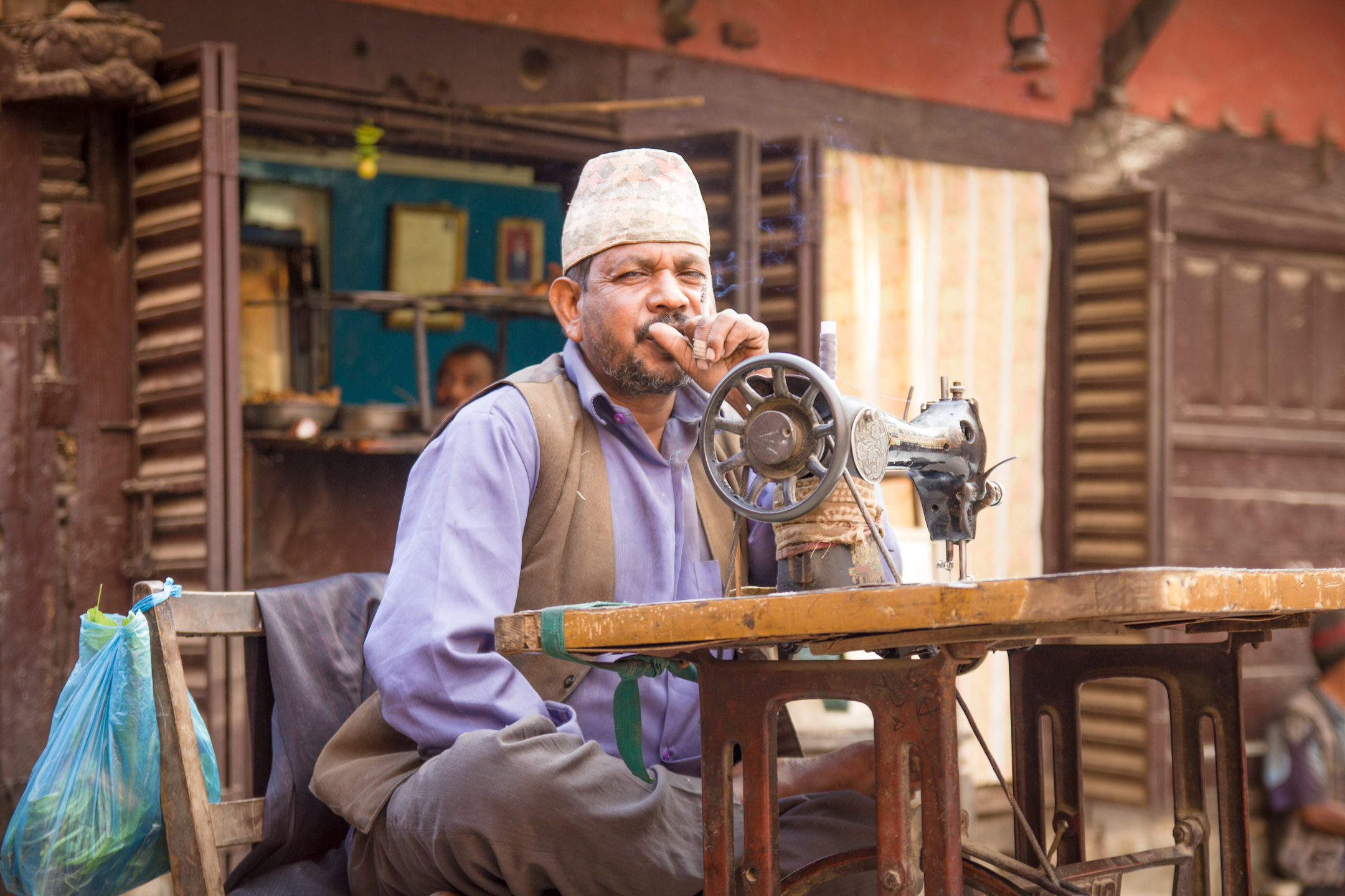 Sastre fumando, su taller funciona a mitad de la calle